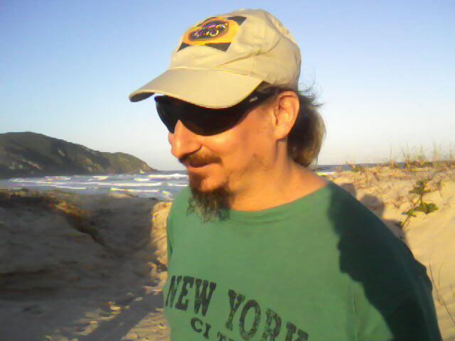 Fábio Luís Bockorny (Musklinho) na praia do Costão do Santinho. Fotografado por Yanto Laitano